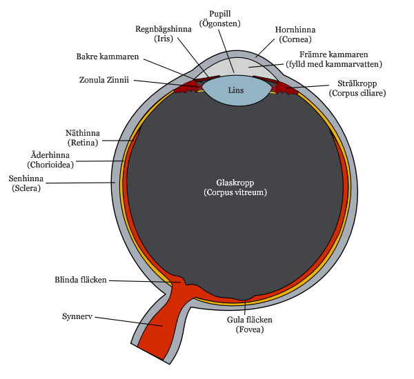 Översättning av sv::en:Image:Schematic diagram of the human eye.png. Terminologi från Nordisk Familjeboks artikel öga.